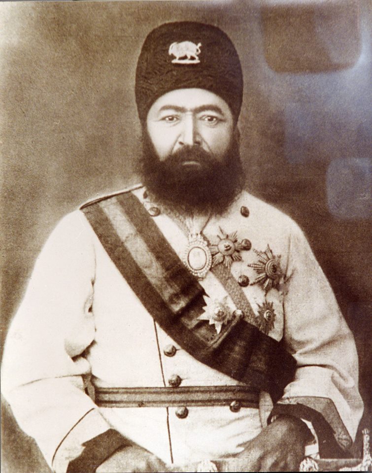 سردار مفخم سهام‌الدوله حاکم بجنورد در دوران قاجاریه